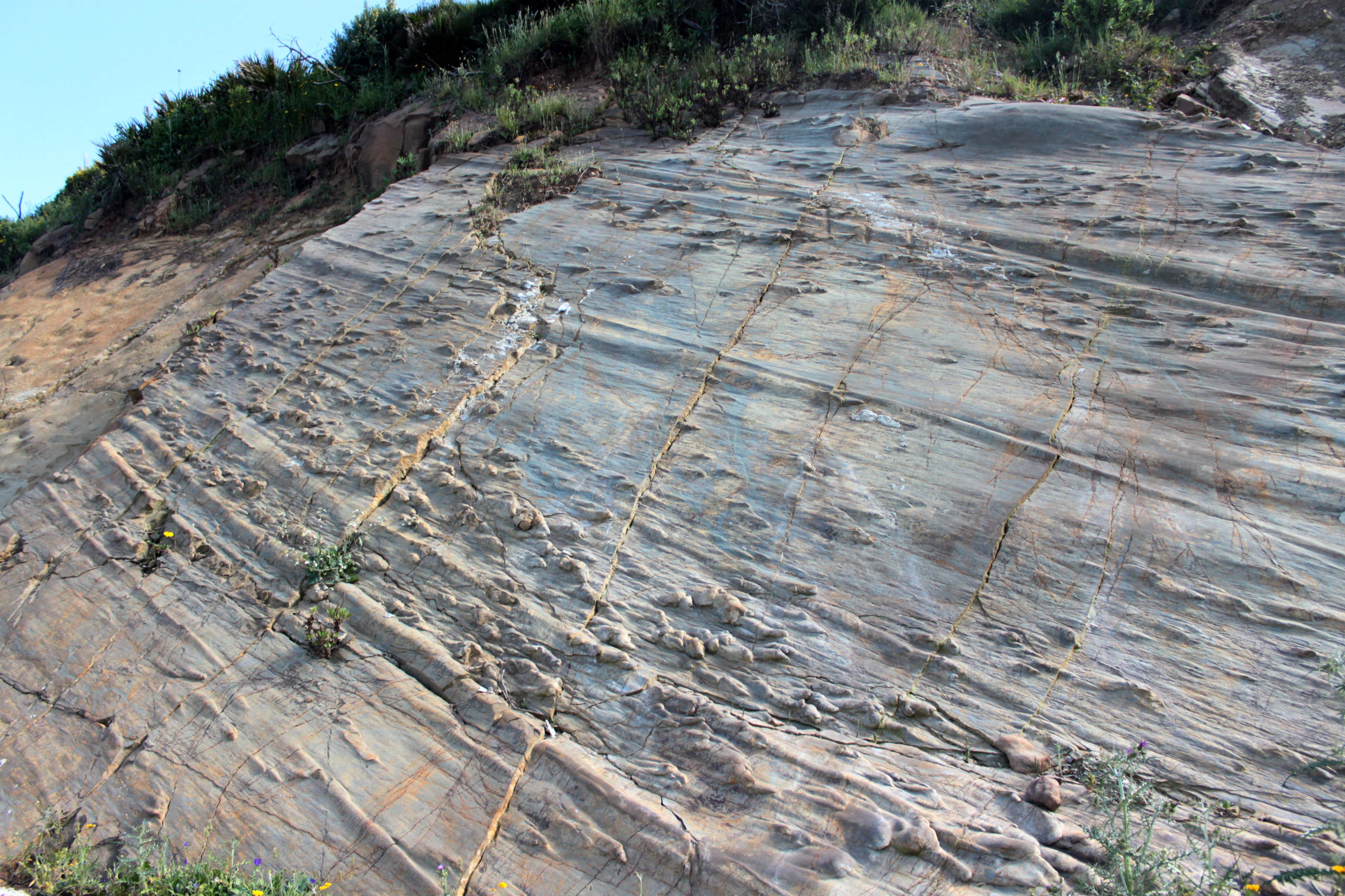 Estructuras denominadas flute cast formada por la acción de corrientes de turbidez sobre los sedimentos depositados en mares poco profundos. Esta capa de sedimentos aparece en los acantilados de punta Carnero en la localidad española de Algeciras.